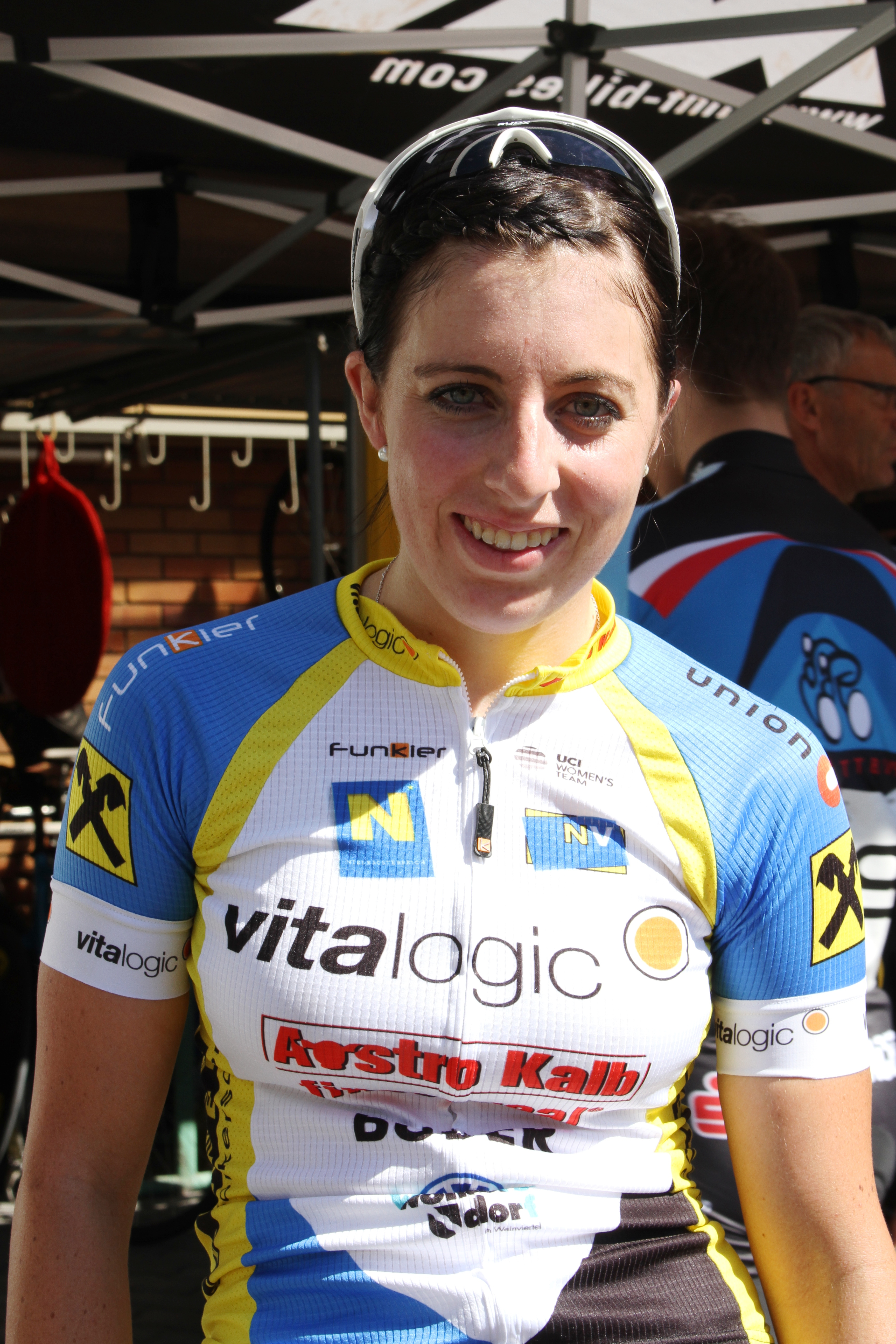 Julia Deuerlein, deutsche Radsportlerin